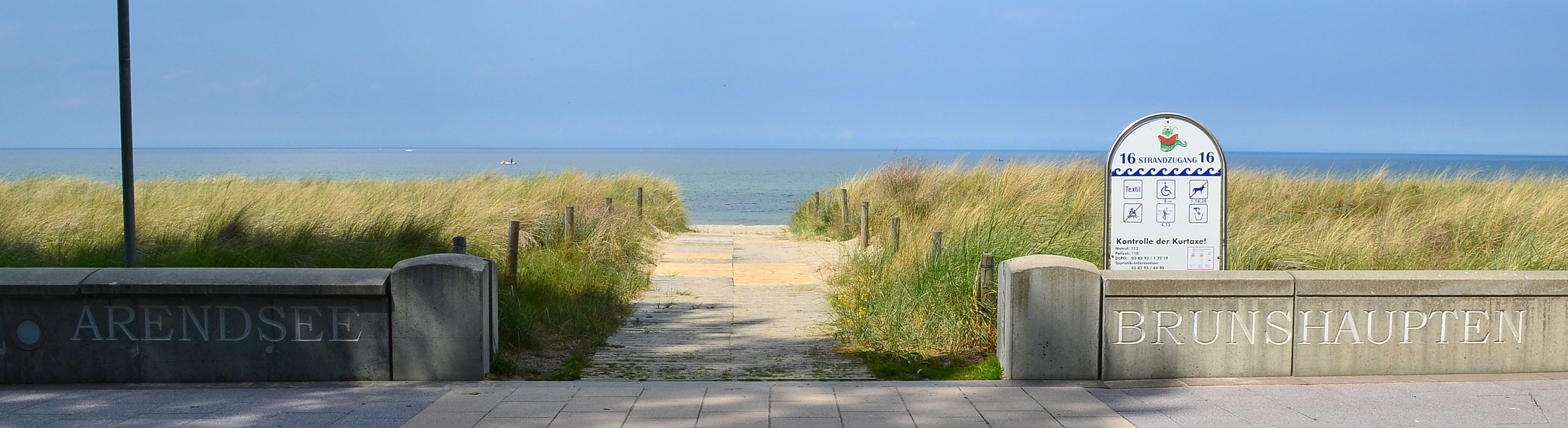 Kühlungsborn, Strandpromenade, ehemalige Grenze der Orte Arendsee und Brunshaupten 9